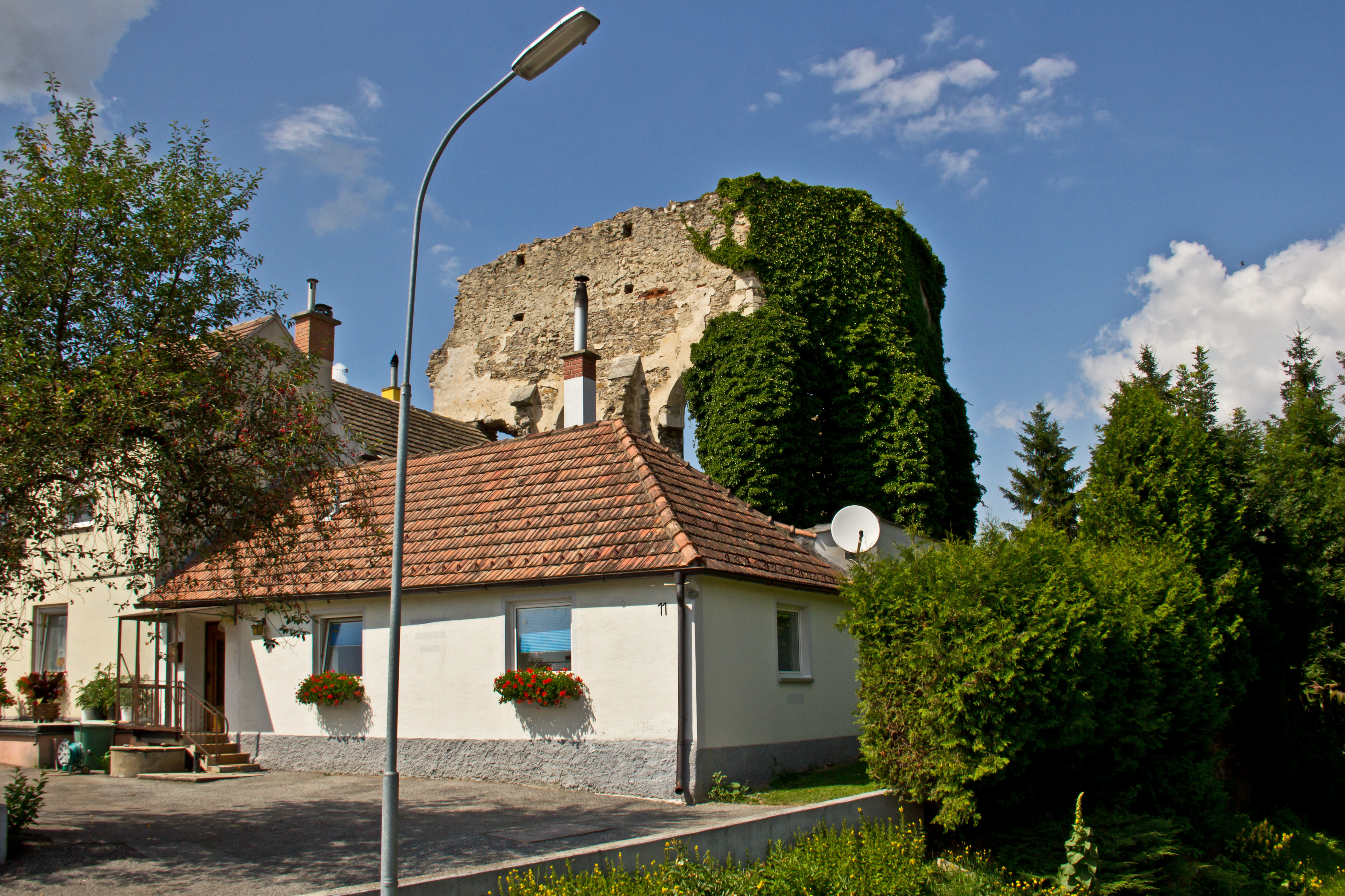 Bei Rafingsberg befindet sich die Ruine der ehemaligen Wallfahrtskirche Sieben Schmerzen Mariens. Sie wurde erstmals als neu erbaute Marienkapelle im Jahr 1455 erwähnt.